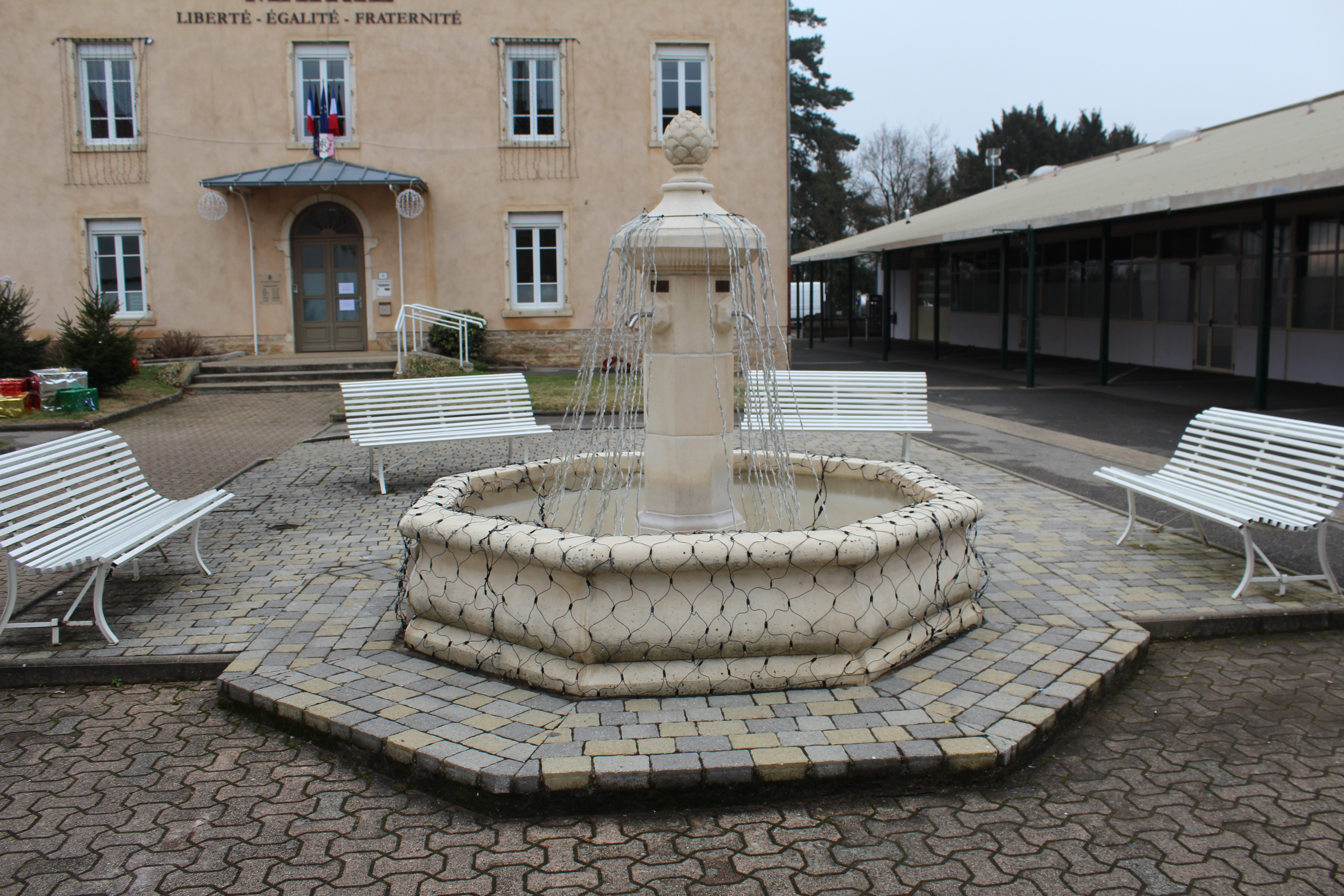 Fontaine des 1400 près de la mairie de Saint-Didier-sur-Chalaronne.